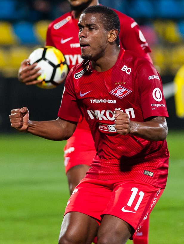 Fernando Lucas Martins